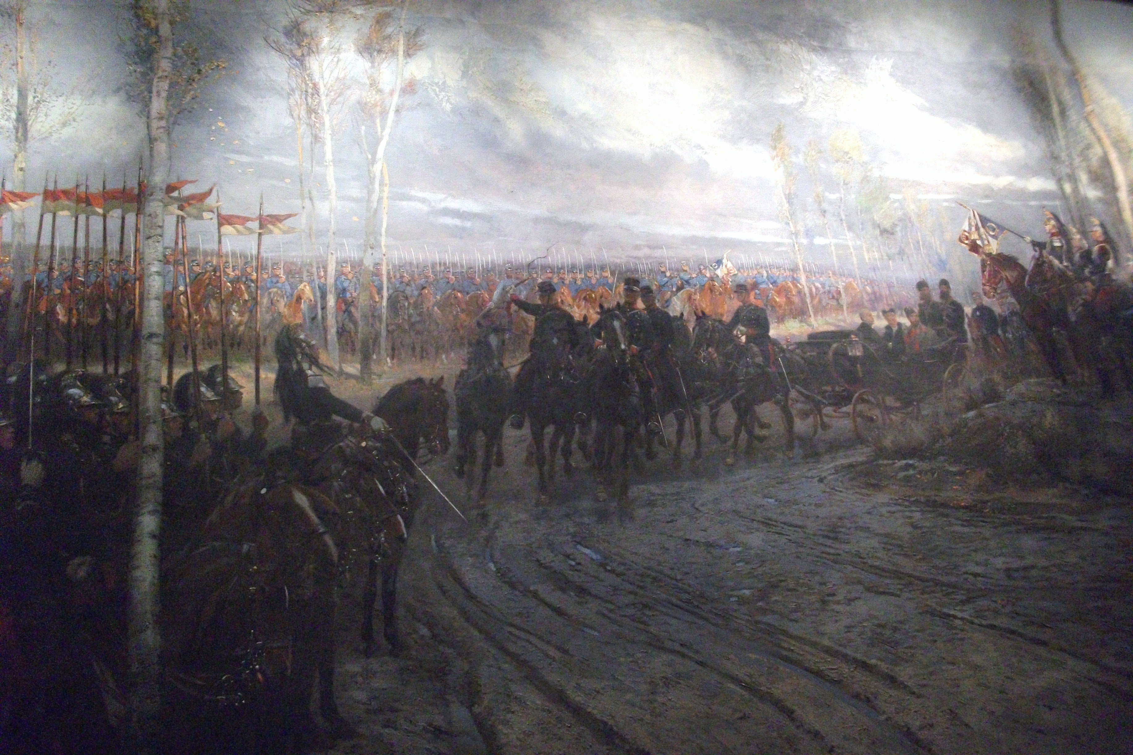 Détail du tableau peint par Edouard Detaille "la revue de Chalons du 9 octobre 1896" se trouvant dans la salle du conseil de la mairie de Chalons. Huile sur toile dépot du musée de Châlons, inv D 936.1.1.